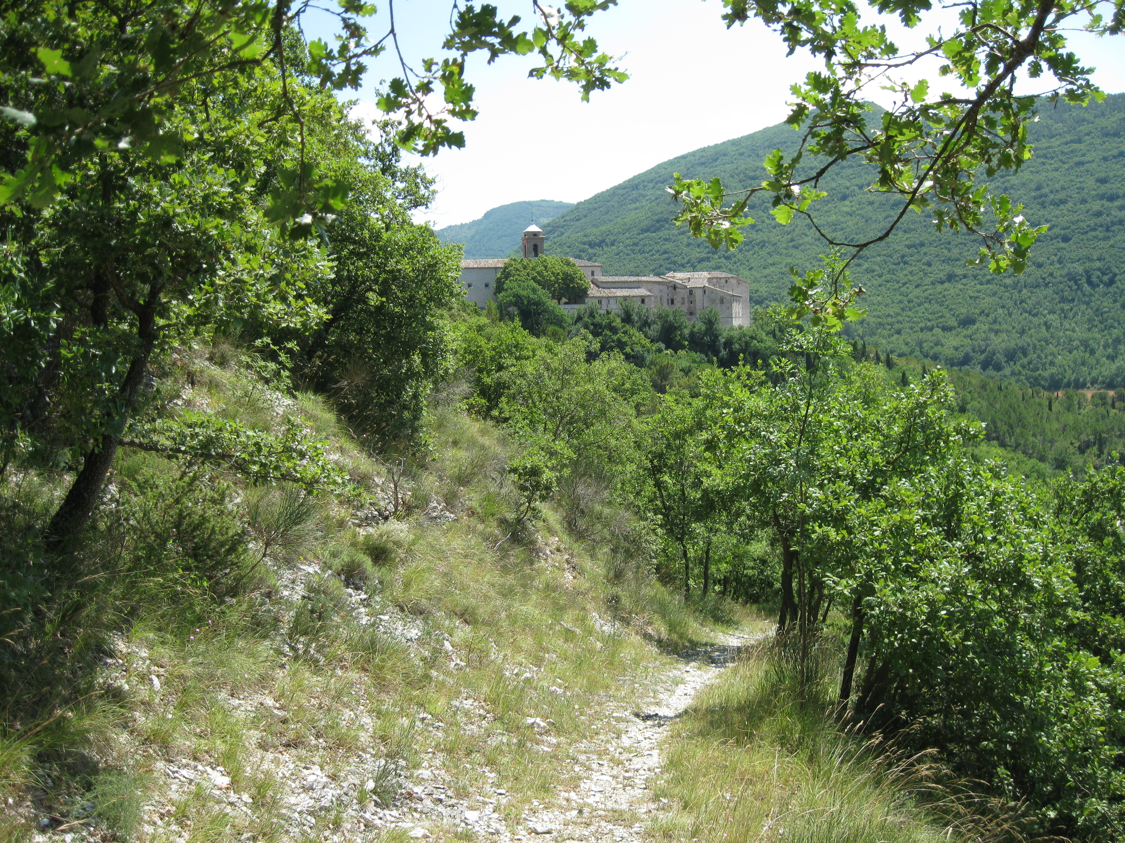 Pavens sti, Genga, Italien